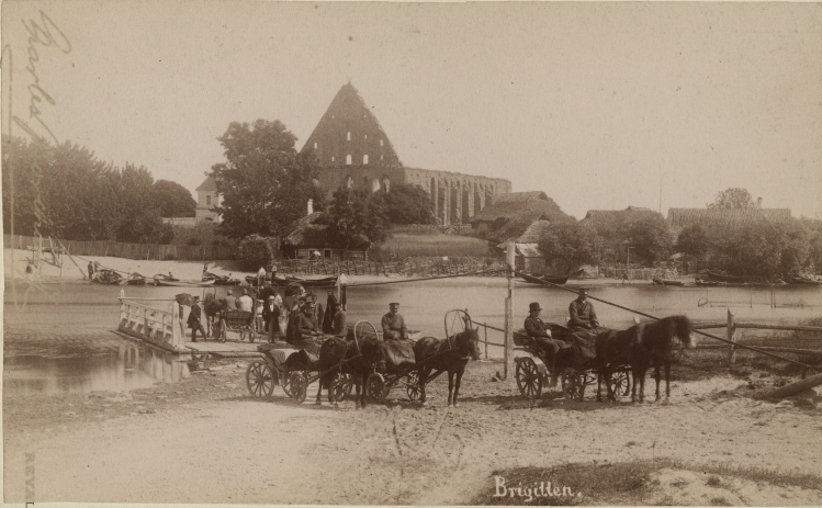 Pirita Kloostri varemed vaadatuna jõe poolt. Esiplaanil Pirita jõgi parvega ja ülesõitjatega. Pirita Klooster ehitati 1407–1436 ja hävitati sõjas 1577. aastal.